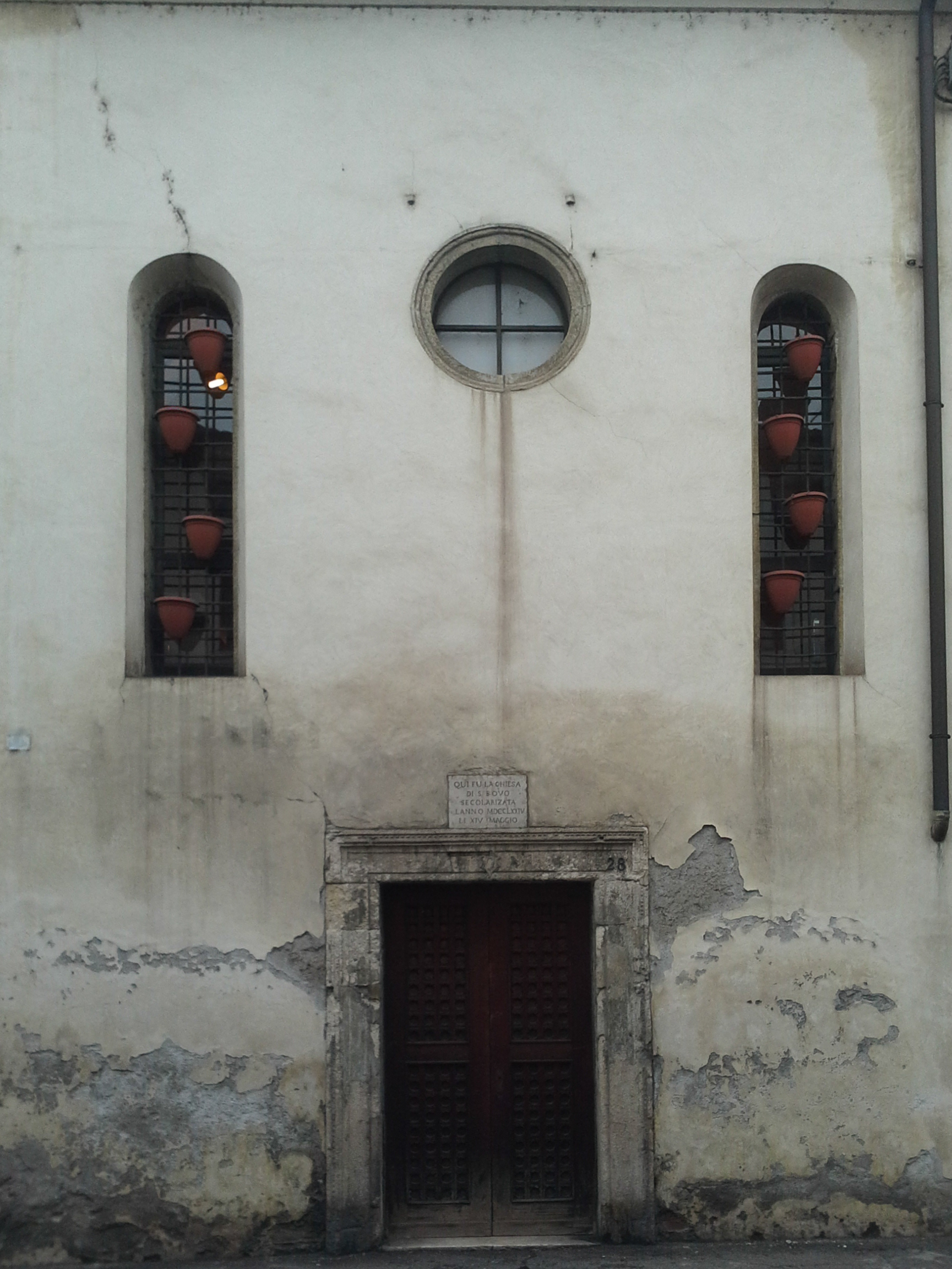 Chiesa di San Bovo a Vicenza - Facciata